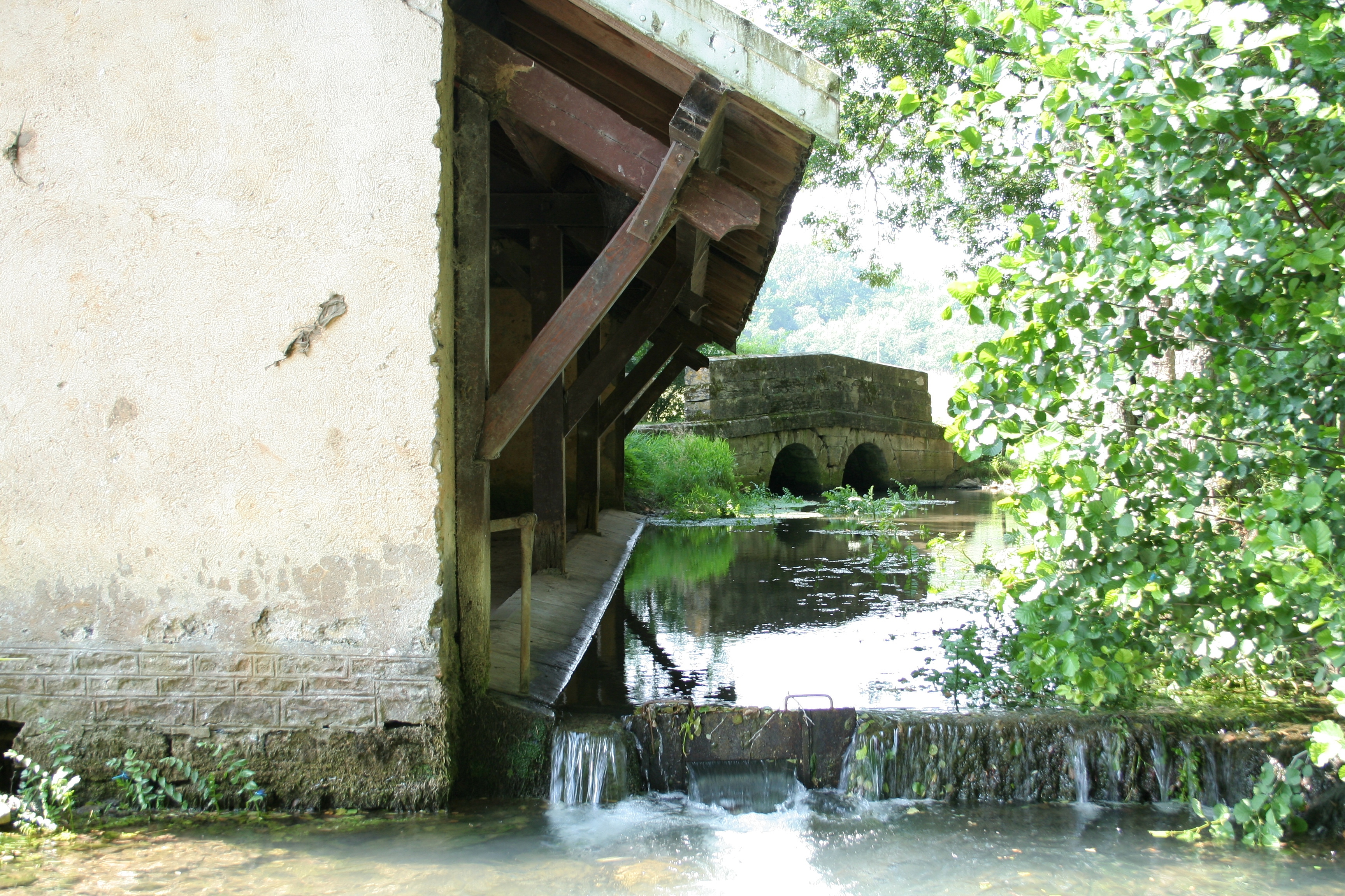 Lavoir de Fretigney, au fil du ruisseau des Dhuits, un affluent de la Romaine